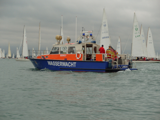 Motorrettungsboot 'Seewolf', stationiert in Lindau am bayerischen Bodensee.